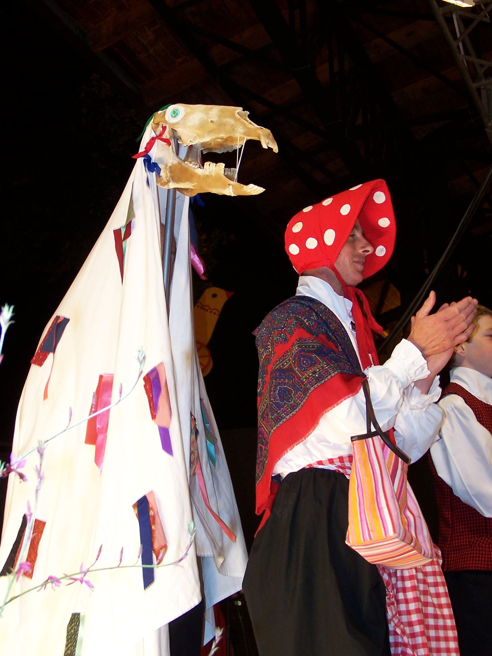 Występ zespołu Dawnswyr Môn z Bethel (Walia) podczas 43. Tygodnia Kultury Beskidzkiej w Żywcu.